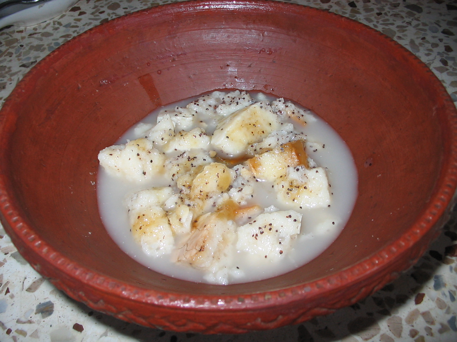 Шулики - Обрядова їжа - спечені коржі, поламані на дрібні шматочки в макітру й залиті медом та розтертим маком